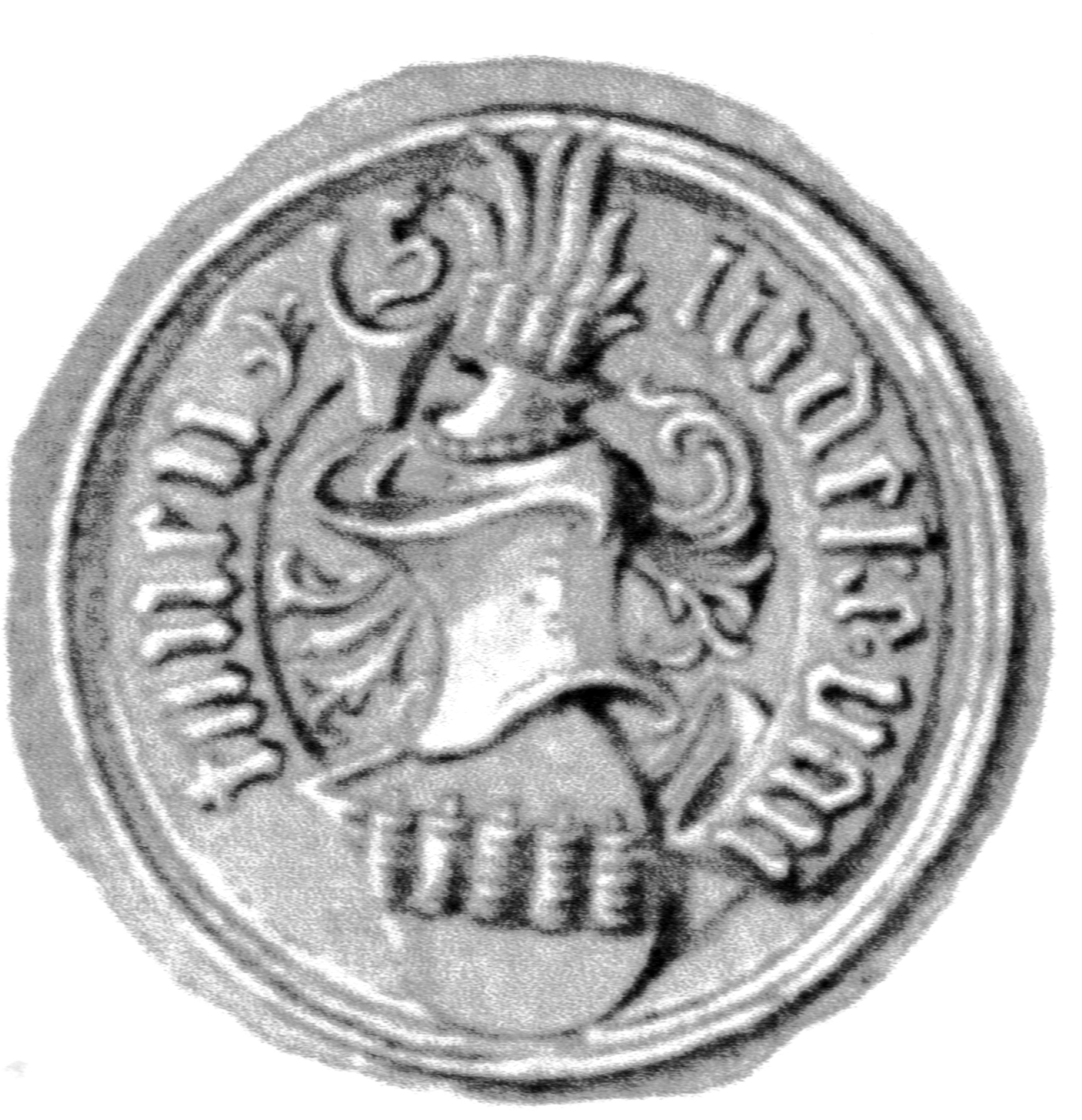 Siegel des Ratsmannes Ludeke van Tunen. Das Siegel stammt aus der Zeit um 1482. Siehe Emil Ferdinand Fehling: Lübeckische Ratslinie, Nr. 553 (Ludeke von Thünen).